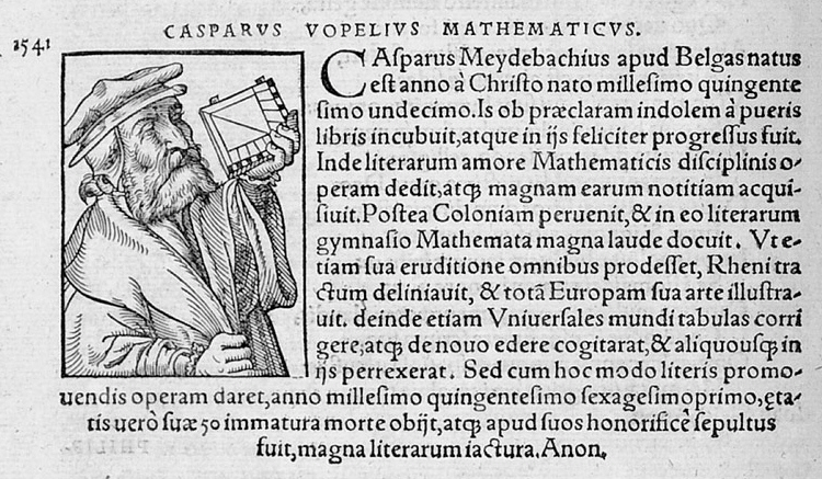 Artikel über Caspar Vopelius mit (evtl. Fantasie-???)Portrait, aus: Heinrich Pantaleon: Prosopographiae heroum atque illustrium virorum totius Germaniae. Basel, N. Brylinger, 1565-1566